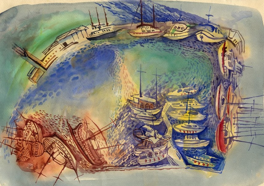 "Атакёй марина. Стамбул", акварель. 1990г.